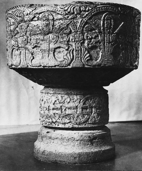 Dopfunt, romansk. Kategori: (04) DopfuntarDopfunt, romansk.